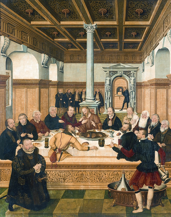 Als Epitaph für den Dessauer Fürsten Joachim (geb. 1509) gestiftet von seinen Neffen, den Fürsten Joachim Ernst und Bernhard. Anstelle der Apostel sind hier evangelische Theologen, u.a.Luther und Melanchton dargestellt. Der Mundchenk ist möglicherweise ein Selbstbildnis Cranachs des Jüngeren. Der Siegelring, den diese Person trägt, zeigt die geflügelte Schlange.